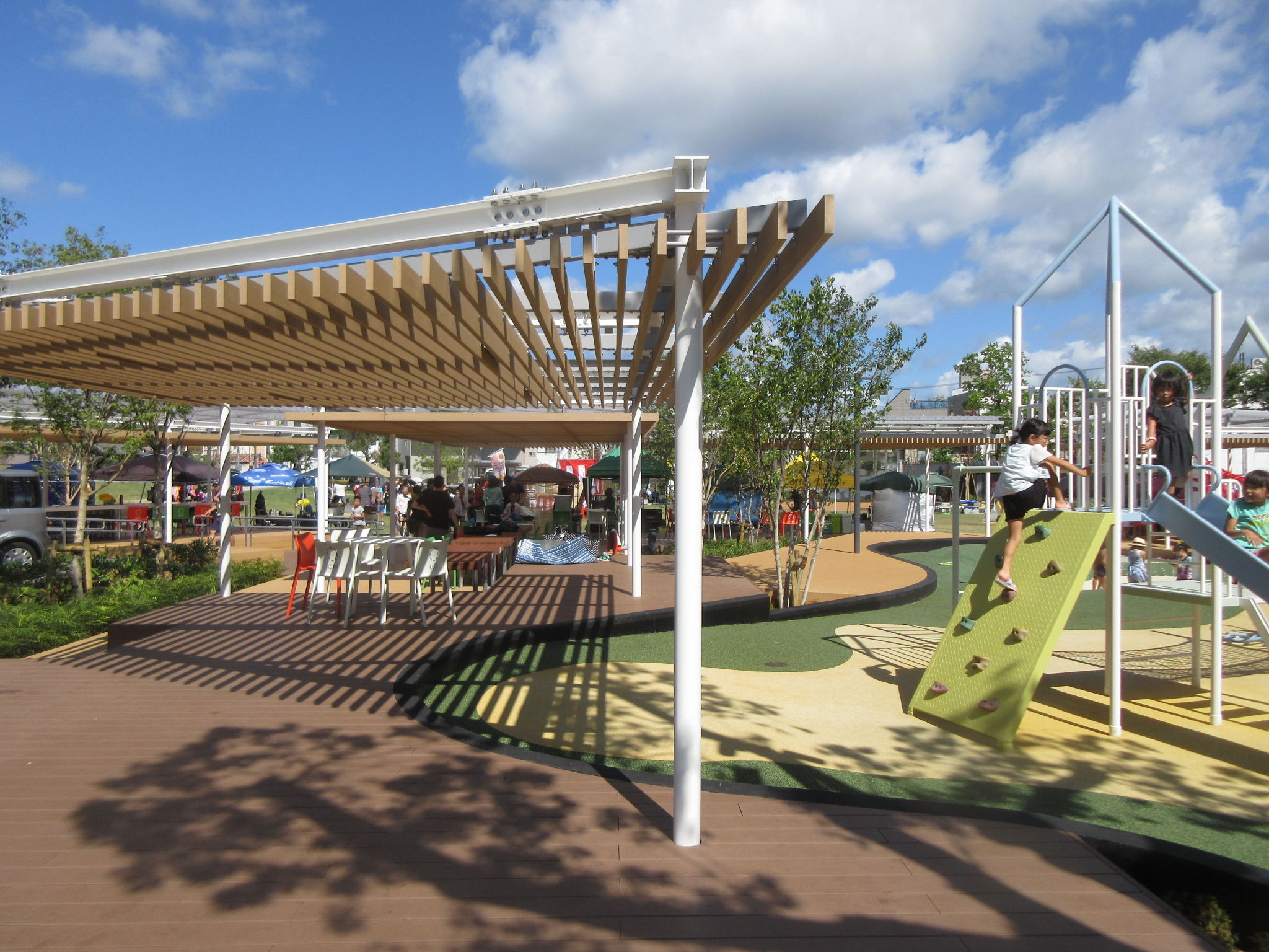 新しく整備された籠田公園（2019年8月撮影）